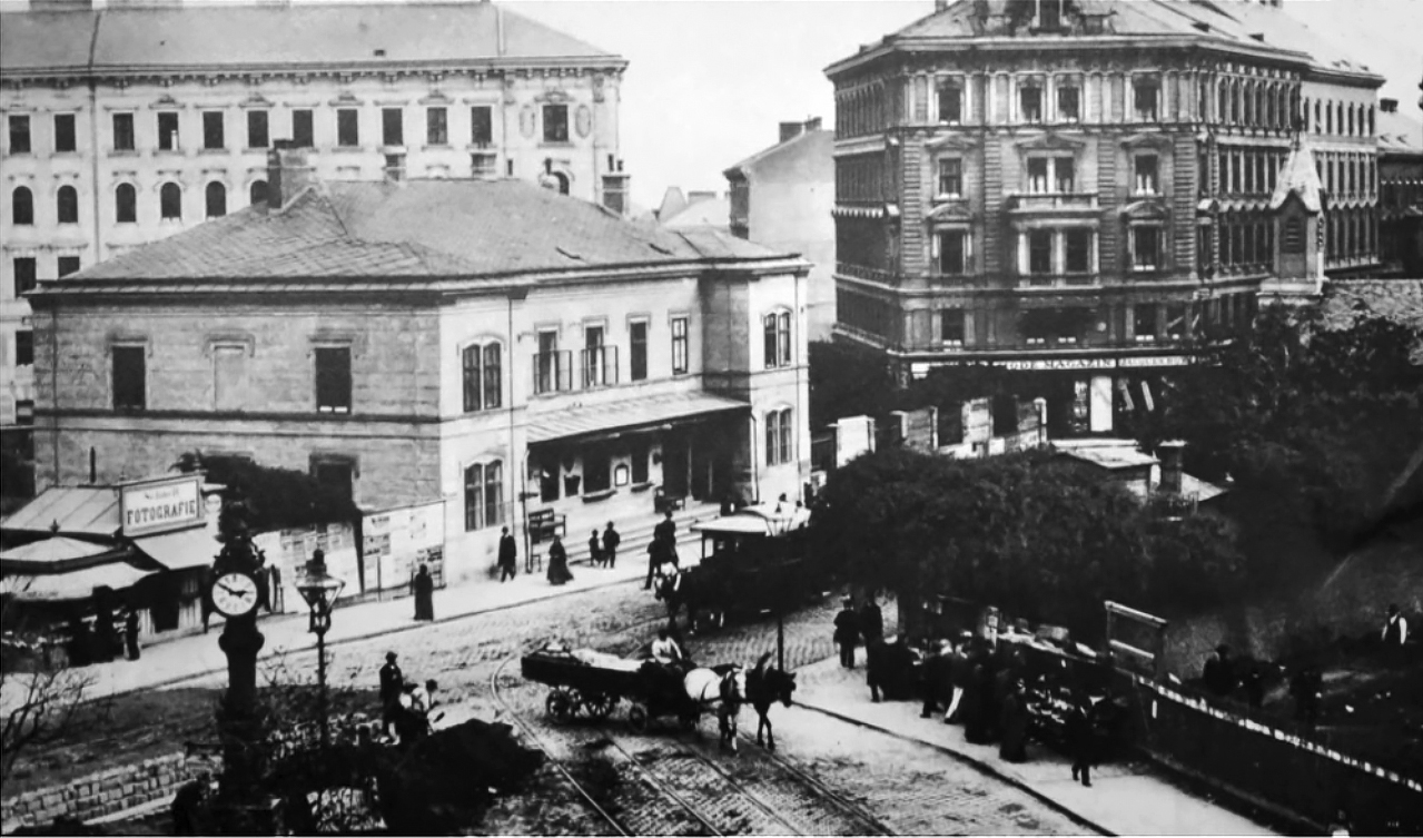 Währinger Linienamt, an der Stelle der späteren Volksoper Wien. Rechts, Anschnitt (samt Turm): St.-Johannes-Nepomuk-Kapelle als Linienkapelle (abgebrochen in den 1890er Jahren und unweit davon als Neuplanung wieder errichtet).